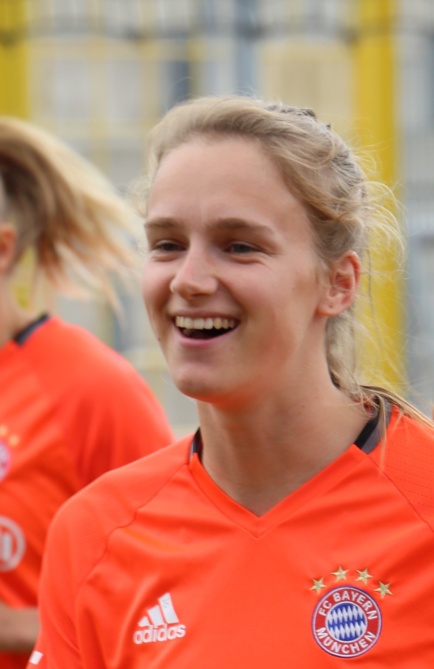 Vivianne Miedema beim Aufwärmen vor dem Frauen-Bundesliga-Spiel FC Bayern München gegen SGS Essen am 21. Mai 2017 im Stadion an der Grünwalder Straße (Ergebnis war 2:0)